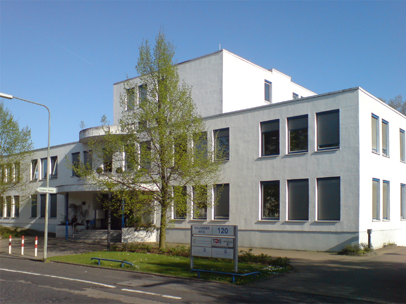 ehemaliger Sitz des Max-Planck-Institutes für europäische Rechtsgeschichte (MPIER) im Hausener Weg 120. 2014 erfolgte der Umzug in das neue Institutsgebäude auf dem Campus Westend, Hansaallee 41 mit einer kleinen Feier zum 50. Geburtstag des Instituts. Seitdem Leerstand dieses Gebäudes.